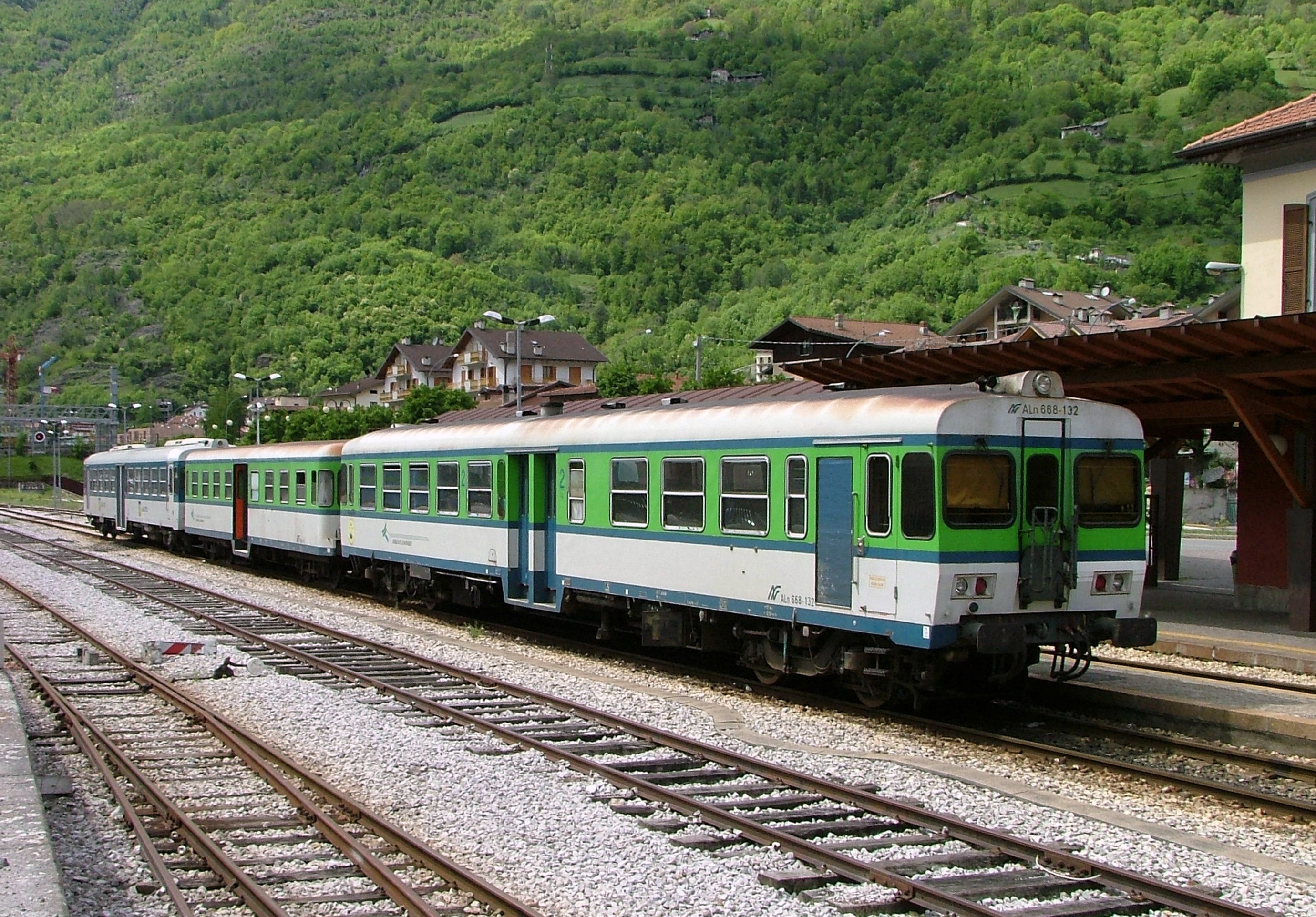 Stazione di Edolo, in primo piano la Aln 668.132